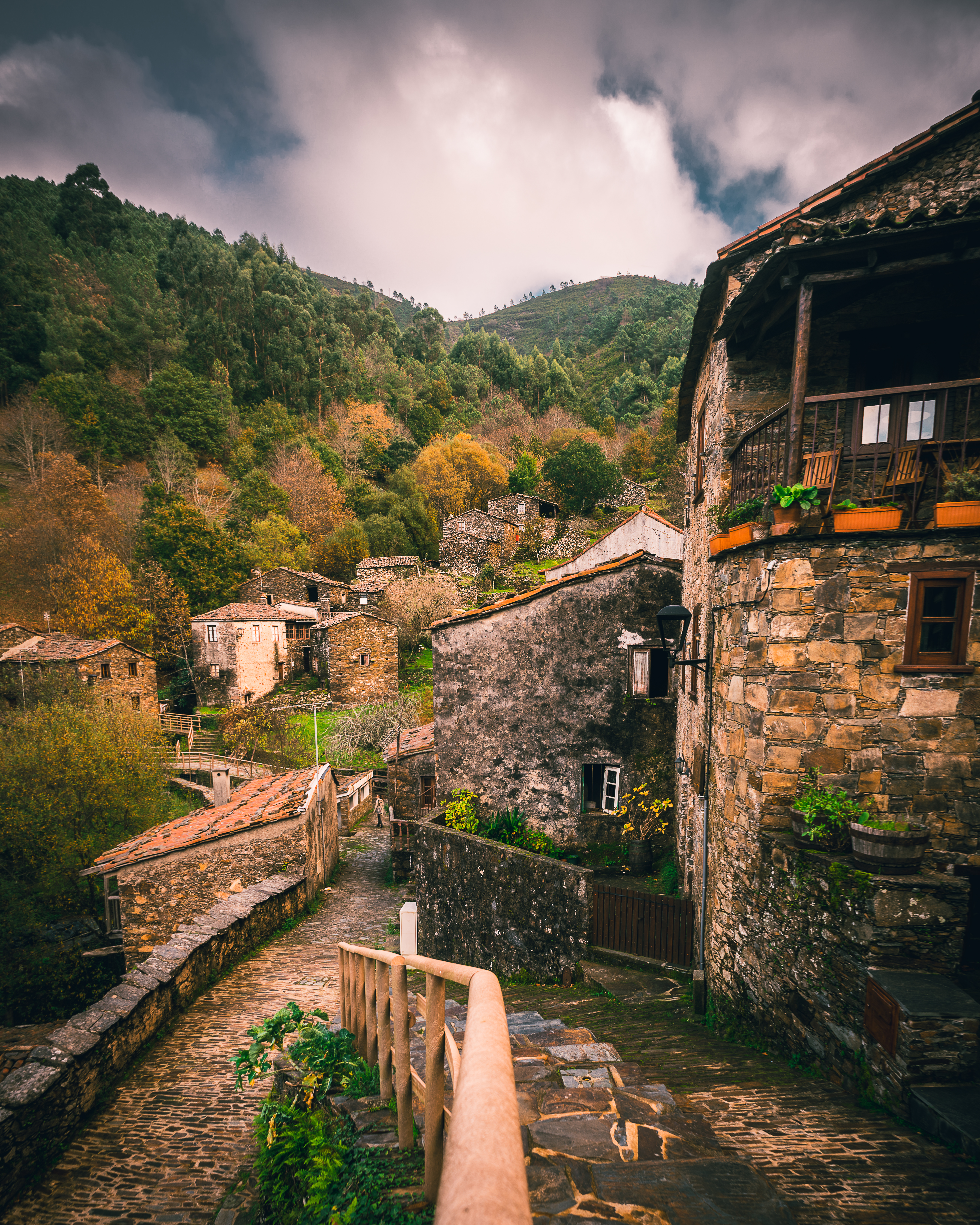 Aldeia de Xisto do Candal - Serra da Lousã This is a photography of a protected area of Portugal indexed in the World Database on Protected Areas with the ID: 555531128 (WDPA)